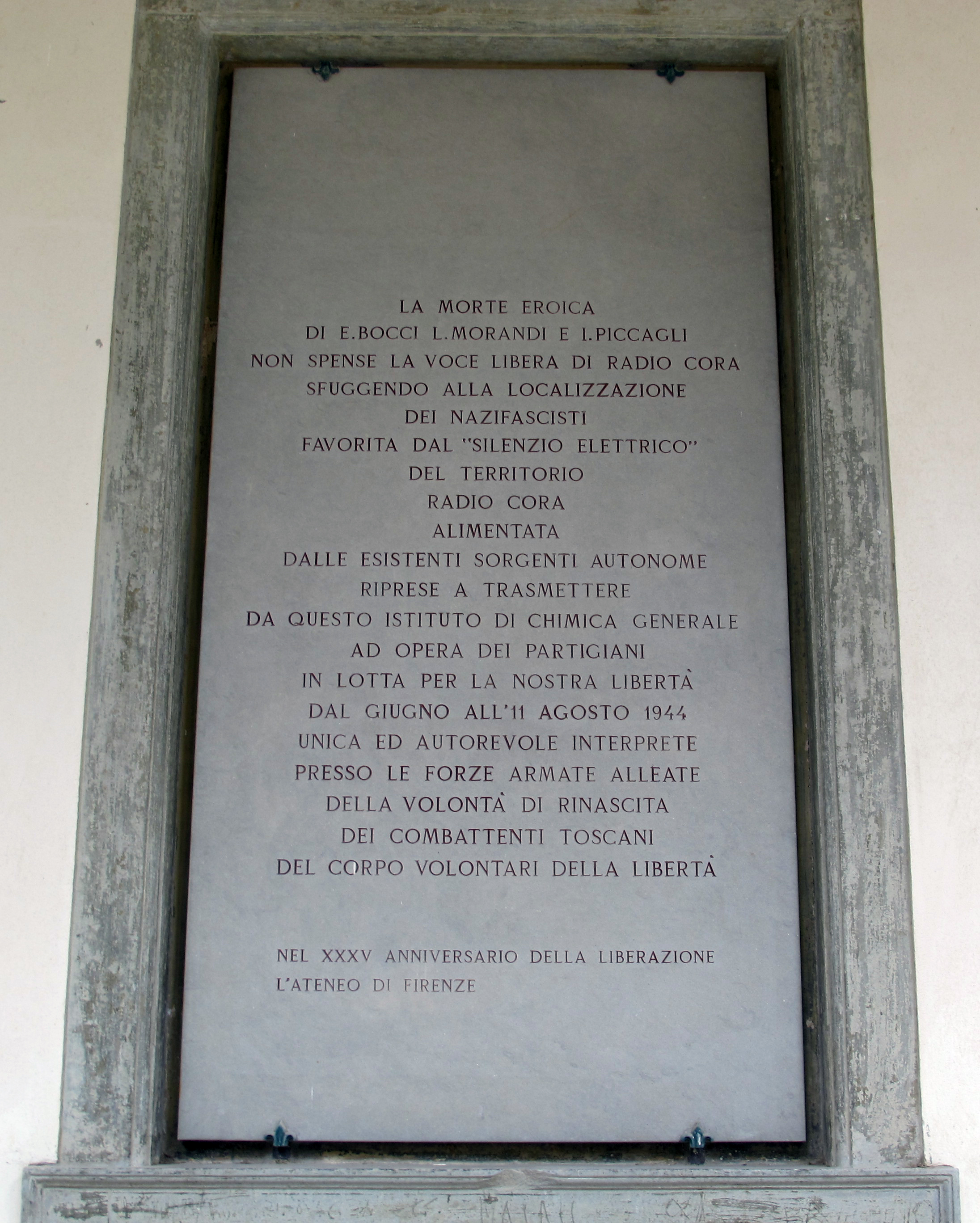 Palazzina de' Servi 09 targa radio cora